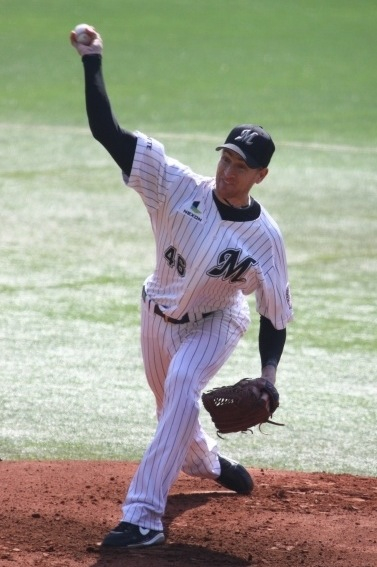 日本プロ野球 千葉ロッテマリーンズ セス・グライシンガー 投手